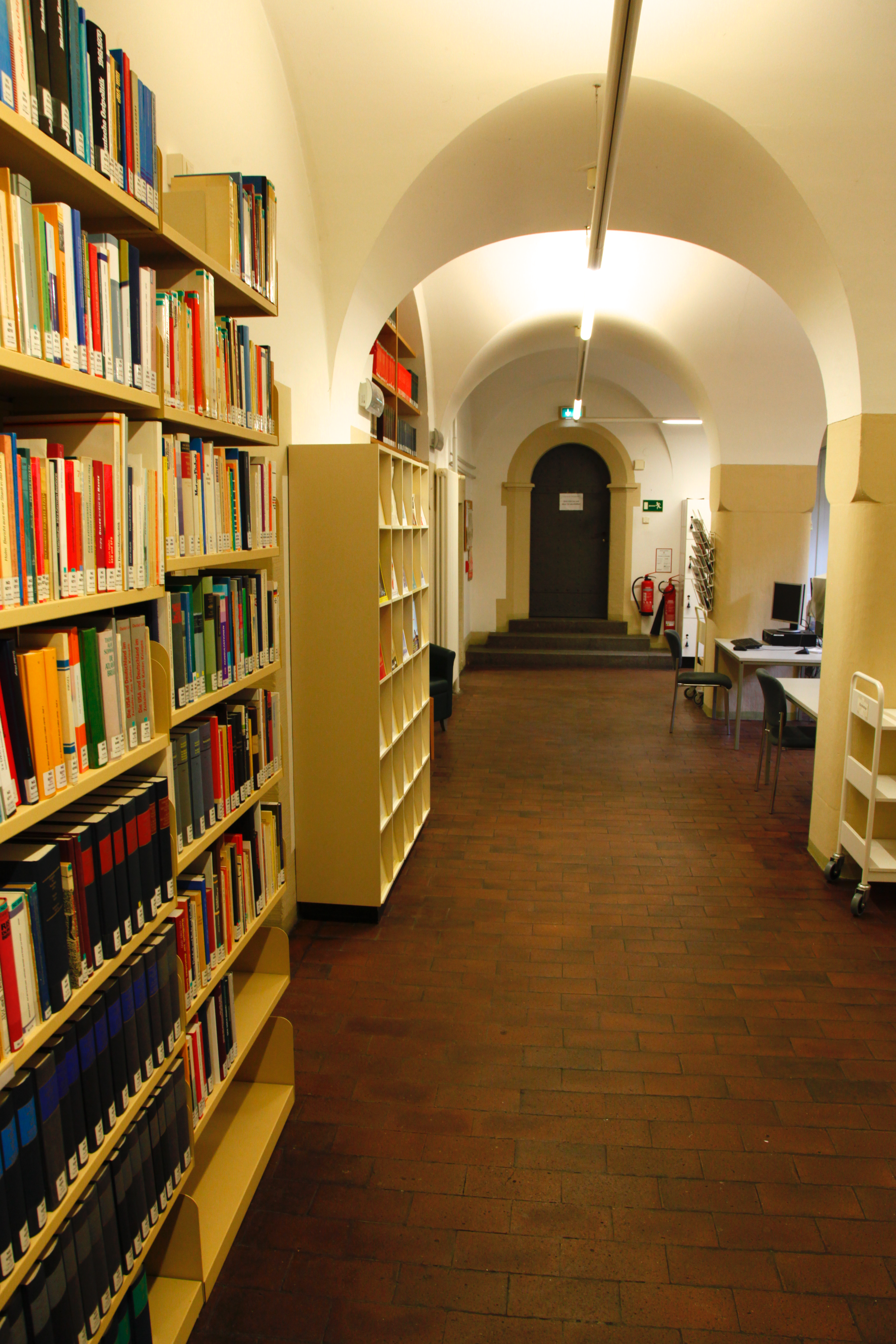 Hannah-Arendt-Institut für Totalitarismusforschung Dresden